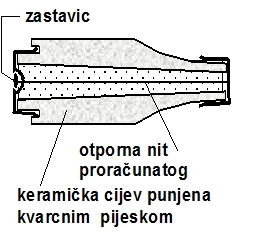 Umetak osigurača - presjek